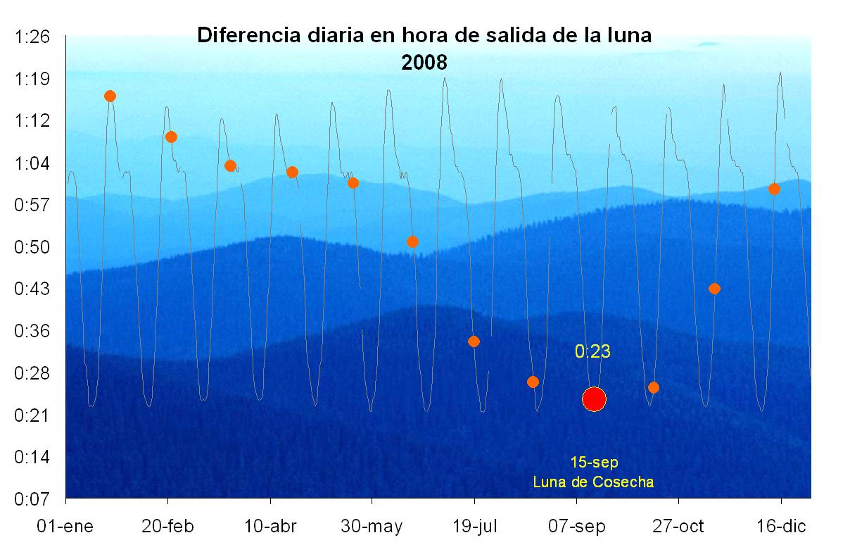 Gráfico que muestra el retraso entre dias consecutivos en la hora de salida de la luna